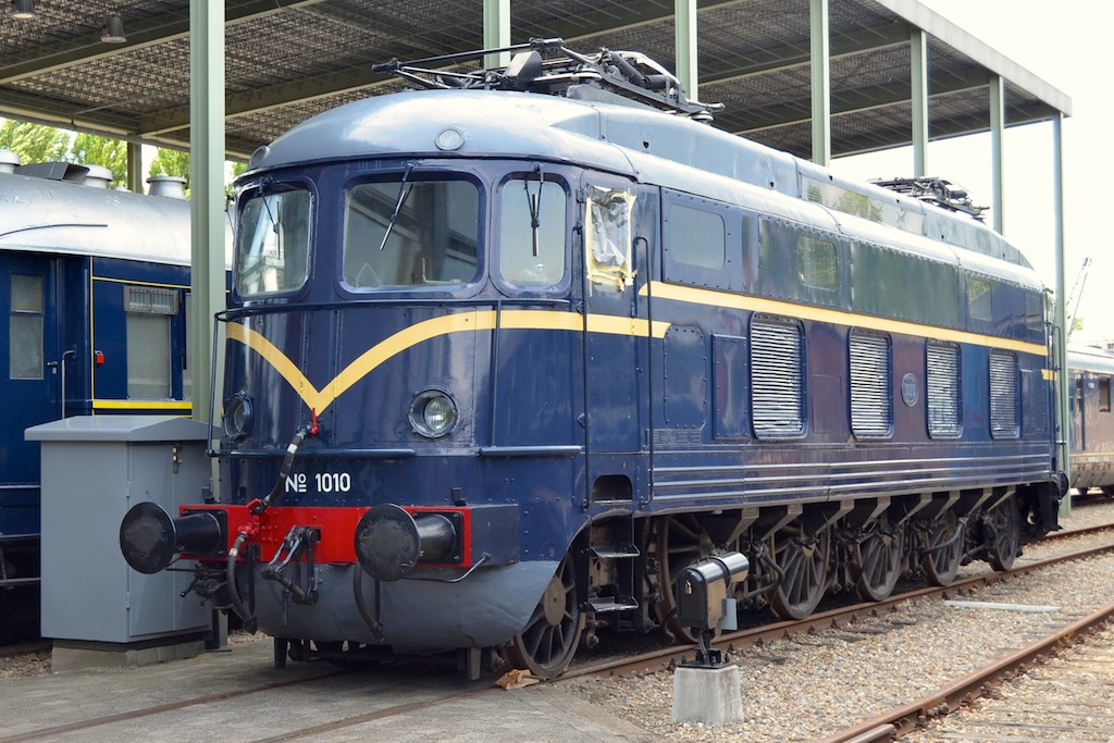 Nederlands Spoorwegmuseum loc NS 1010. Foto: Erik Swierstra.